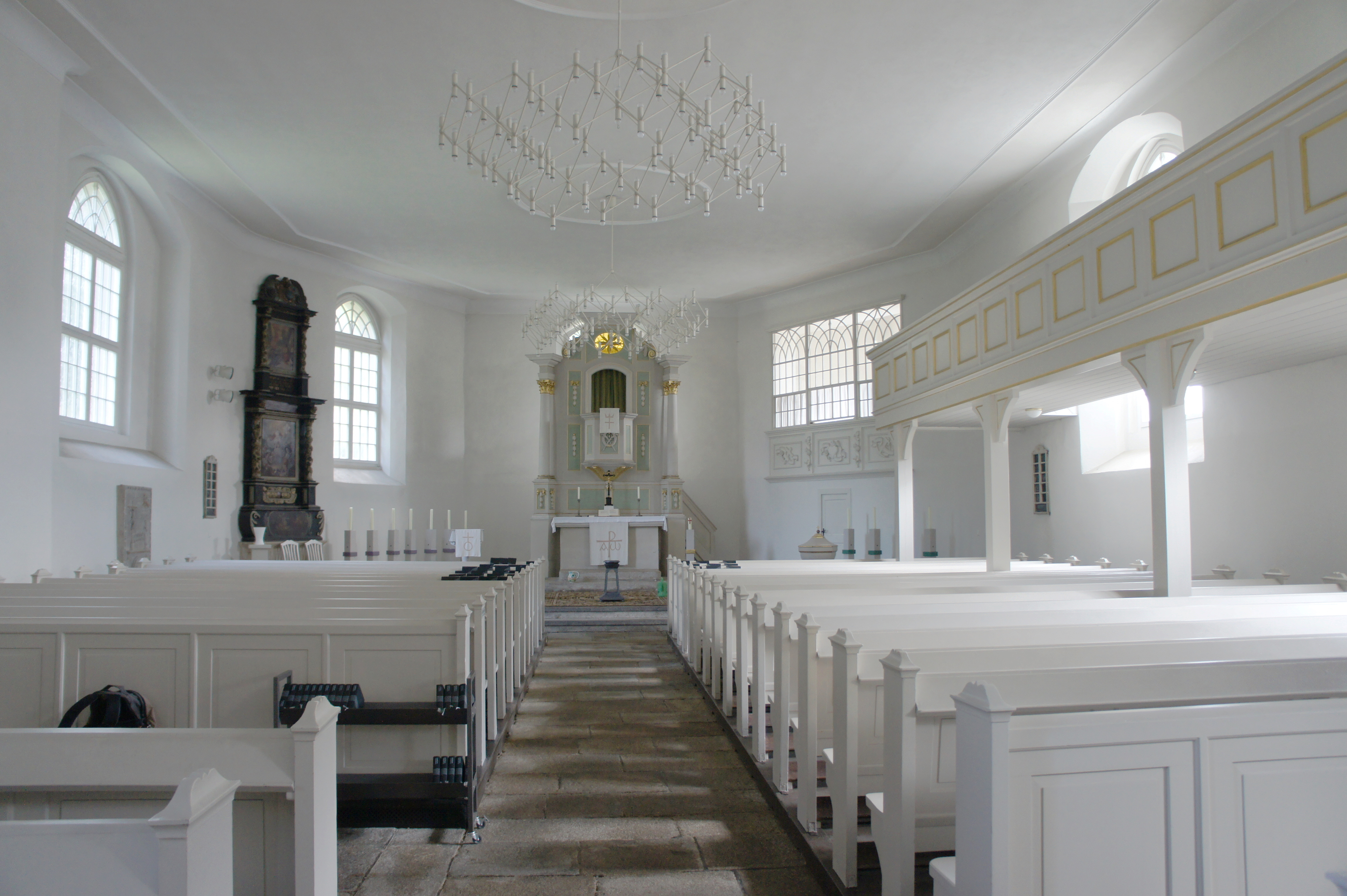 Taucherkirche in Bautzen. Ursprung der Kirche im 15. Jh., jetziger Bauzustand Ende 19. Jh., heute hauptsächlich für Konzerte und als Begräbniskirche genutzt.